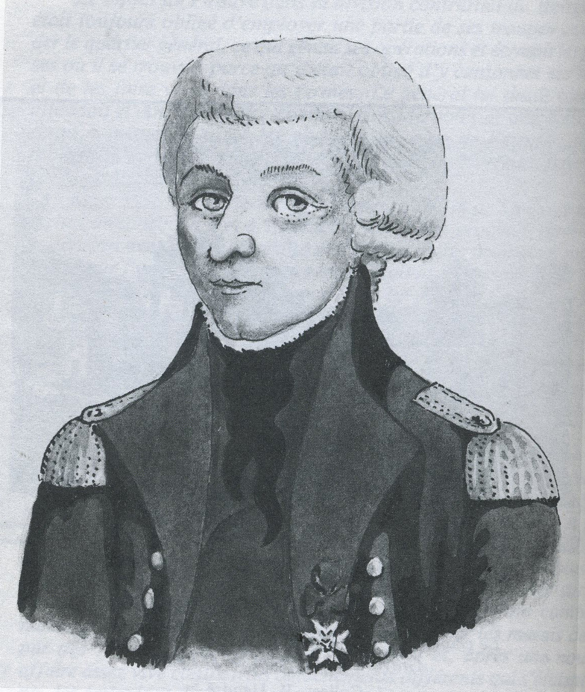 Gervais Marie Eugène Tuffin de La Rouërie (1765-1796)